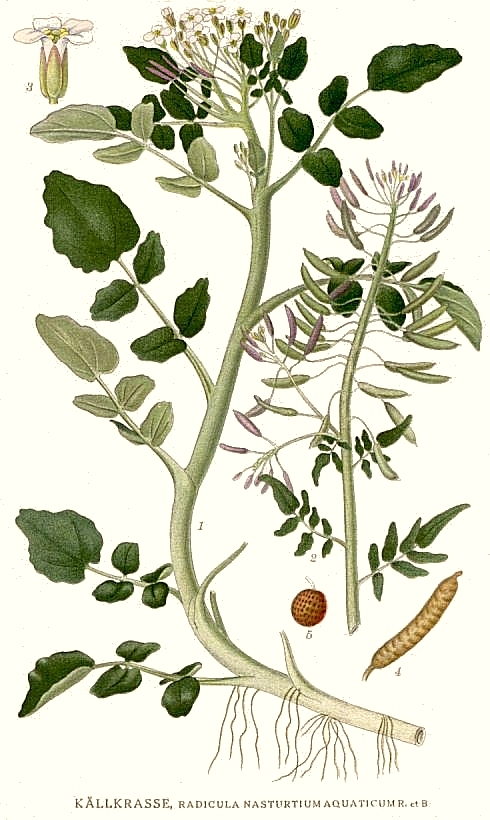 Nasturtium officinale var. officinale, syn. Rorippa nasturtium-aquaticum (L.) Hayek, Radicula nasturtium-aquaticum (L.) Britten & Rendle Original Description Källkrasse, Radicula nasturtium aquaticum R. et B.